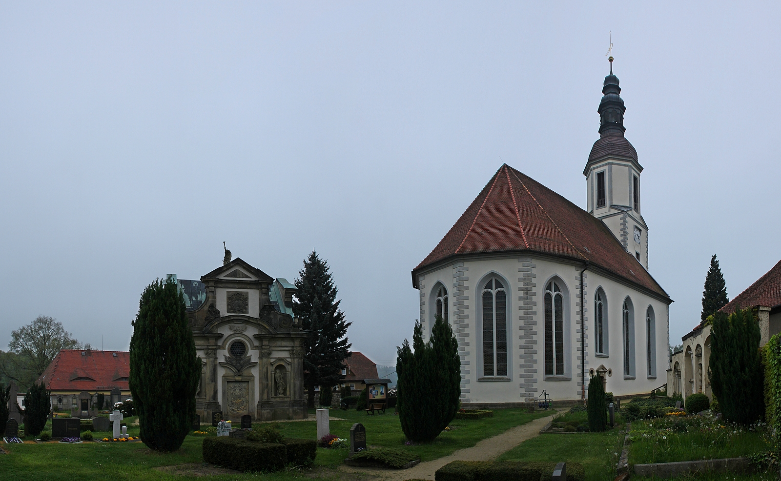 Hainewalde: Blick auf die evangelische Kirche und die Kanitz-Kyawsche Gruft. Die heutige Kirche von Hainewalde ist wahrscheinlich der dritte Kirchenbau des Ortes. Die Grundsteinlegung erfolgte 1705, die Weihe 1711. Der Bau wurde durch den Einfall der Schweden in Sachsen von 1703 bis 1705 unterbrochen. Bauherren und Stifter der Kirche waren der kursächsische Obrist Otto Ludwig von Kanitz (1661-1724) und seine Gattin Victoria Tugendreich von Kanitz geb. von Kyaw (1657-1716). Das Äußere der Kirche ist schlicht gehalten. Mit reichlich 50 Metern zählt der Turm zu den höchsten Dorfkirchtürmen der Oberlausitz. Die gesamte Kirchenausstattung befindet sich noch im ursprünglichen Zustand vom Anfang des 18. Jahrhunderts. Dies verleiht der Kirche einen besonderen kulturellen und kunsthistorischen Wert. Die 1715 erbaute Gruft gilt als bedeutenstes Werk barocker Grabmalkunst der gesamten Oberlausitz. Das Äußere der Gruft ist reich mit Säulen, Wappen und weiterem Beiwerk verziert. Hauptaugenmerkt bilden 17 Sandsteinstauen, von denen je vier an jeder Seite und ein Engel als Freifigur auf dem Dach der Gruft angebracht sind. Die Statuen sind thematisch geordnet und bilden Gegensatzpaare, bei denen je ein irdisches Leiden einer himmlischen Seligkeit gegenübergestellt wird. Besondere Beachtung verdienen die Figuren irdischen Leidens, die sehr realitätsnah dargestellt sind, während die Allegorien himmlischer Glückseligkeit Idealgestalten sind. (Am Kirchberg 6, Denkmal-Nr. 09271033, Sachgesamtheits-Nr. 09303500)